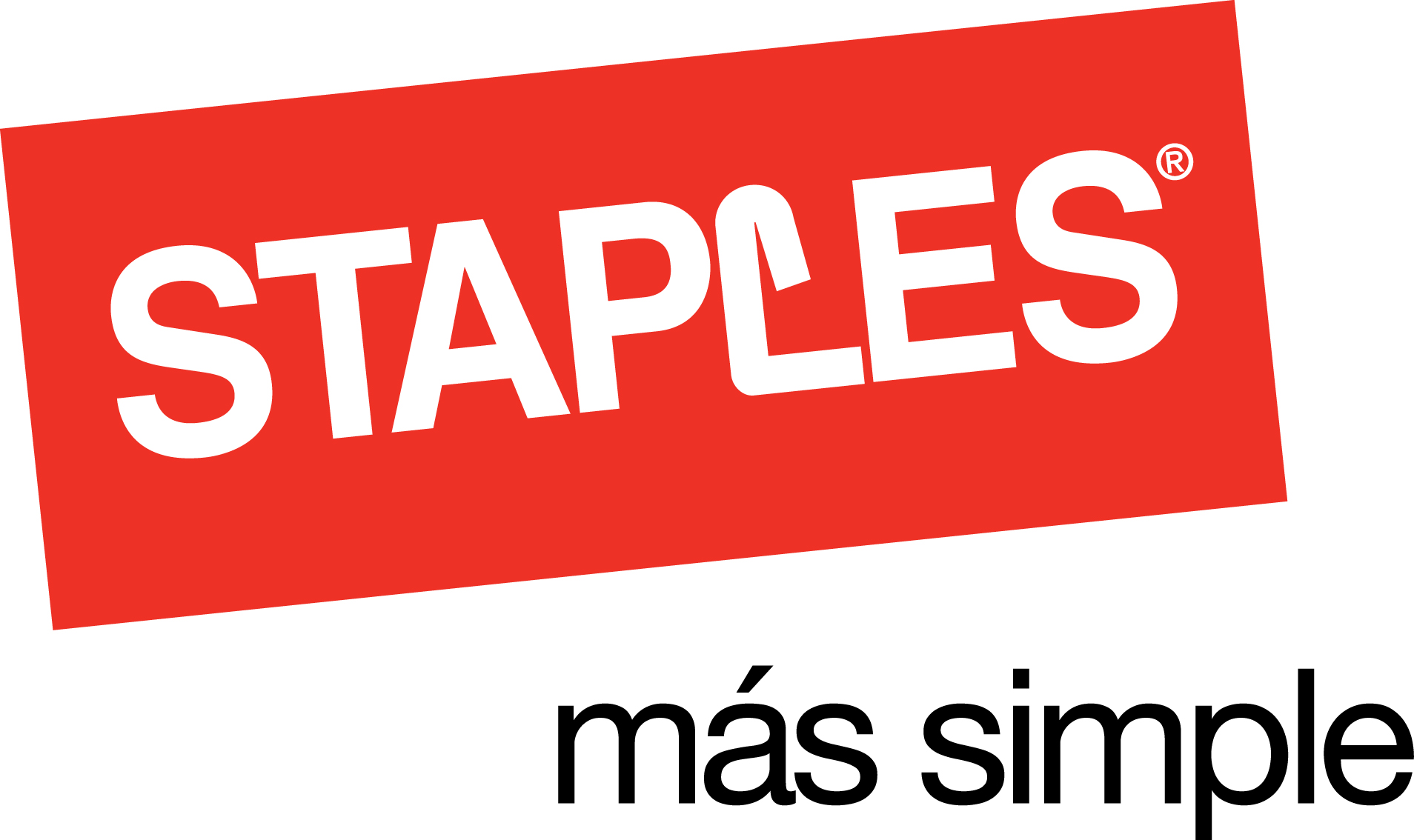 Logotipo de Staples Argentina en 2018